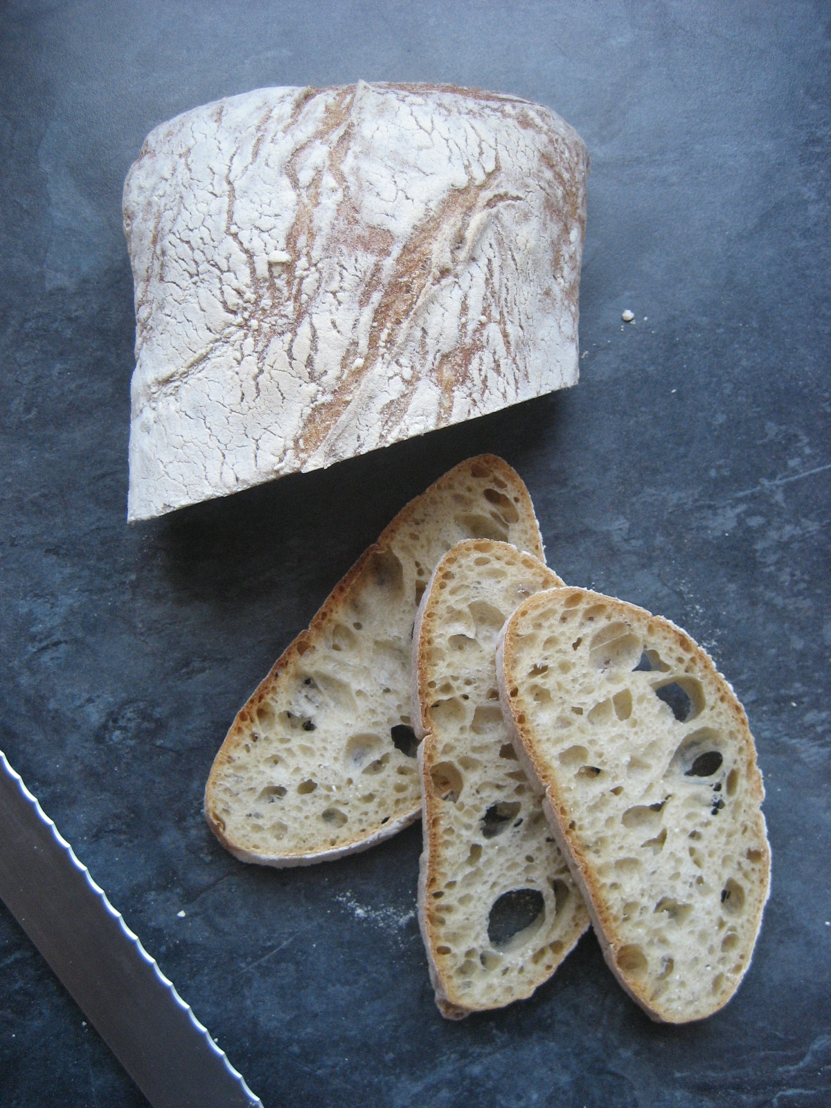 de la ciabatta